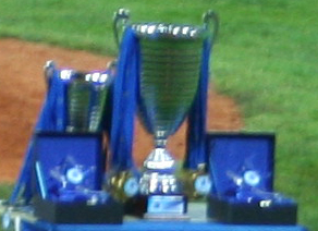 La Coppa dei Campioni di baseball.